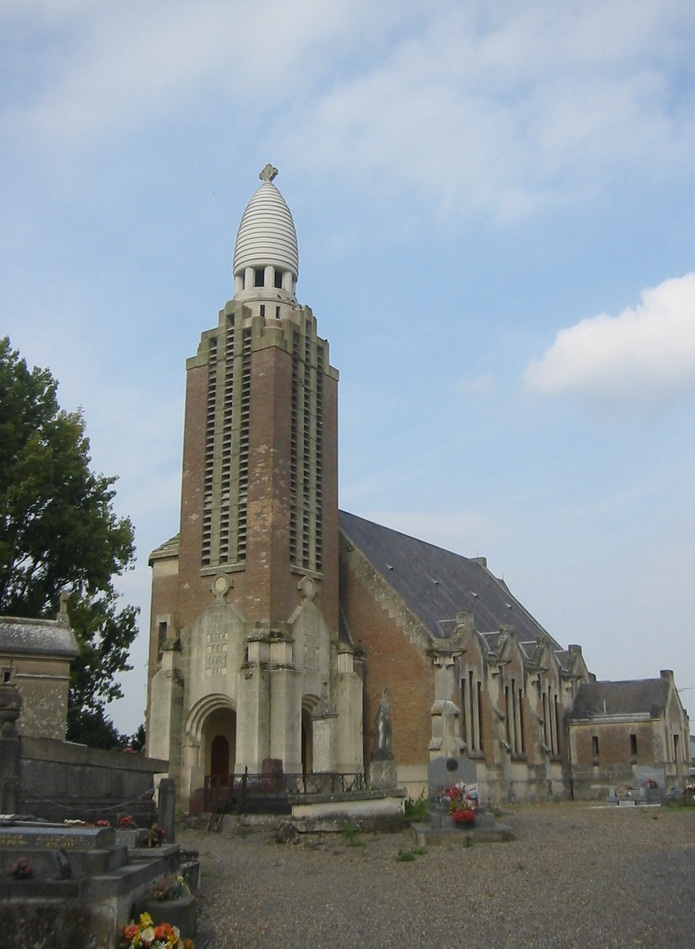 Eglise de Mayot.